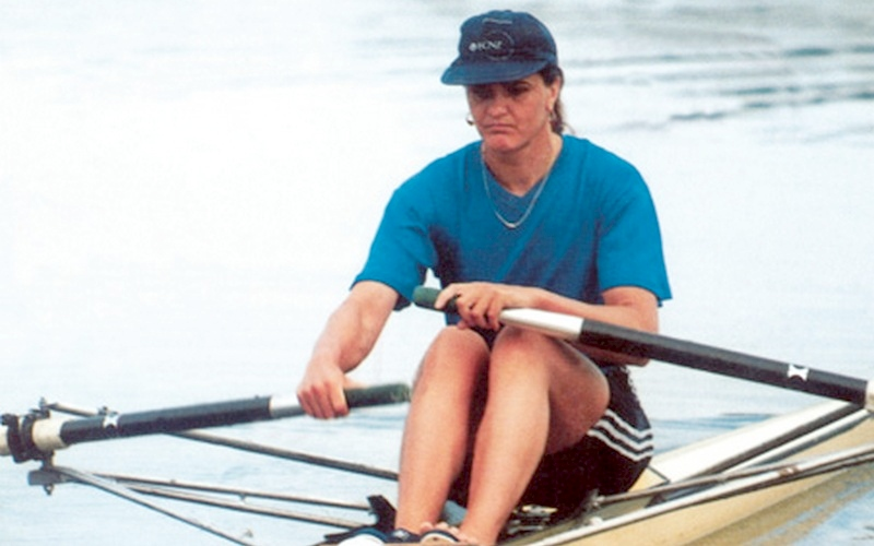 Elisabeta Lipă